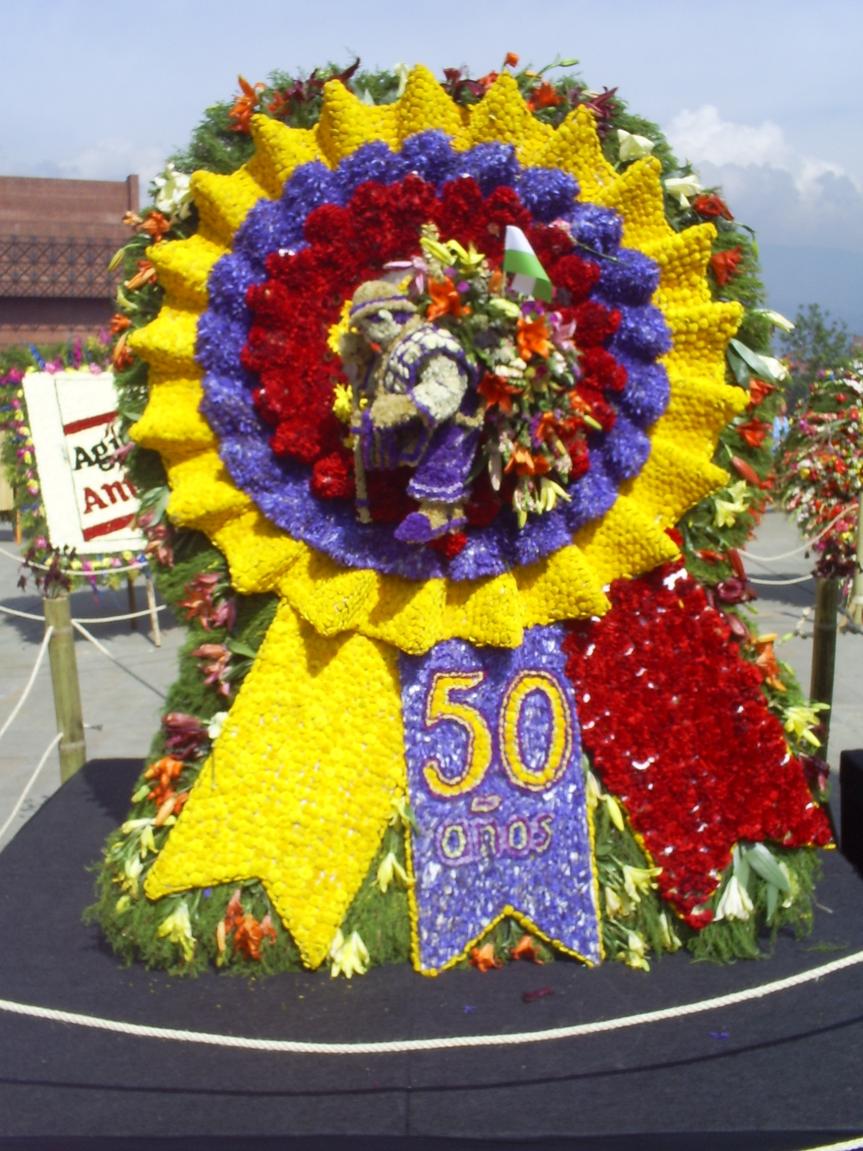 Desfile de Silleteros 2007 (una de las silletas ganadoras), silletas expuestas después del desfile. Medellín, Colombia.